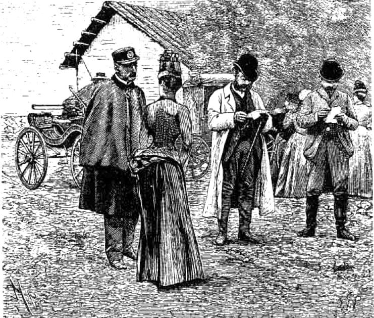 Saliendo de Cauquenes: General Baquedano, c.North y acompañantes. En Cauquenes, North organizó una cena bailable a la que invitó al General Baquedano, héroe del ejercito chileno que se encontraba a punto de partir con una misión militar a Europa